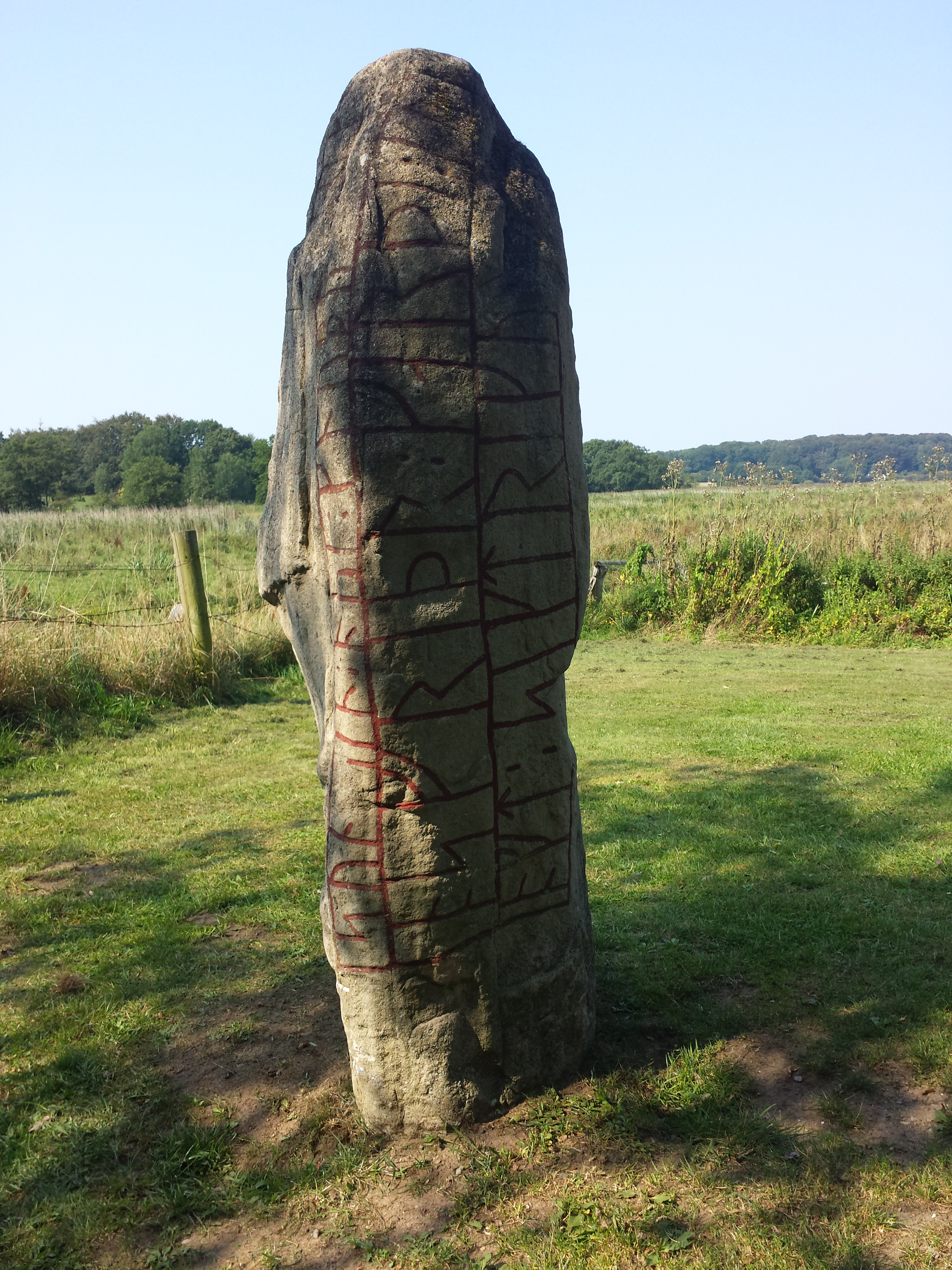 Nachbildung des Großen Sigtryggsteins (DR2), aufgestellt in der Nähe des Fundortes des Originals.